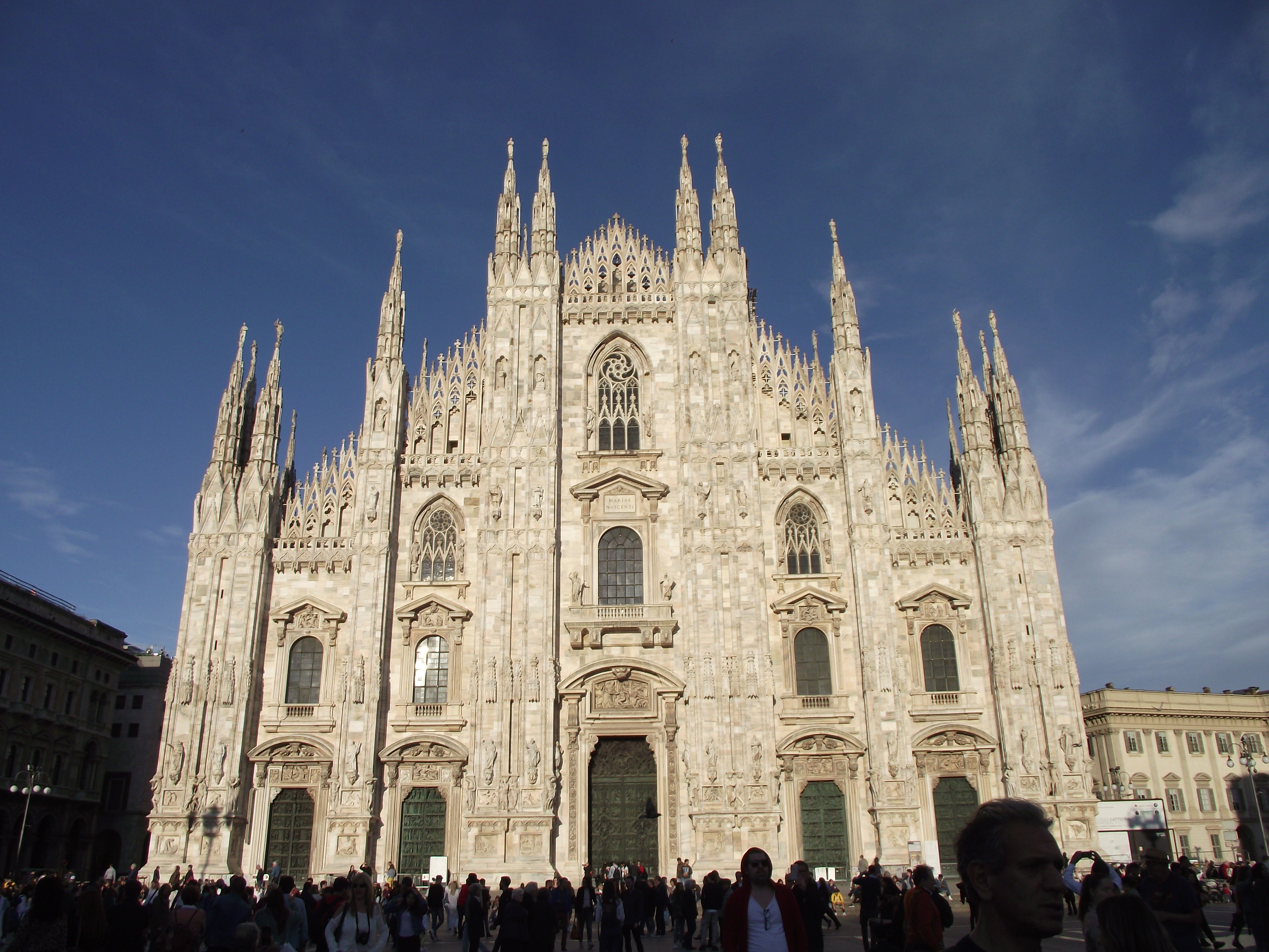 Facciata